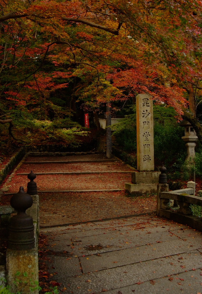 毘沙門堂 Fujifilm FinePix S5 Pro